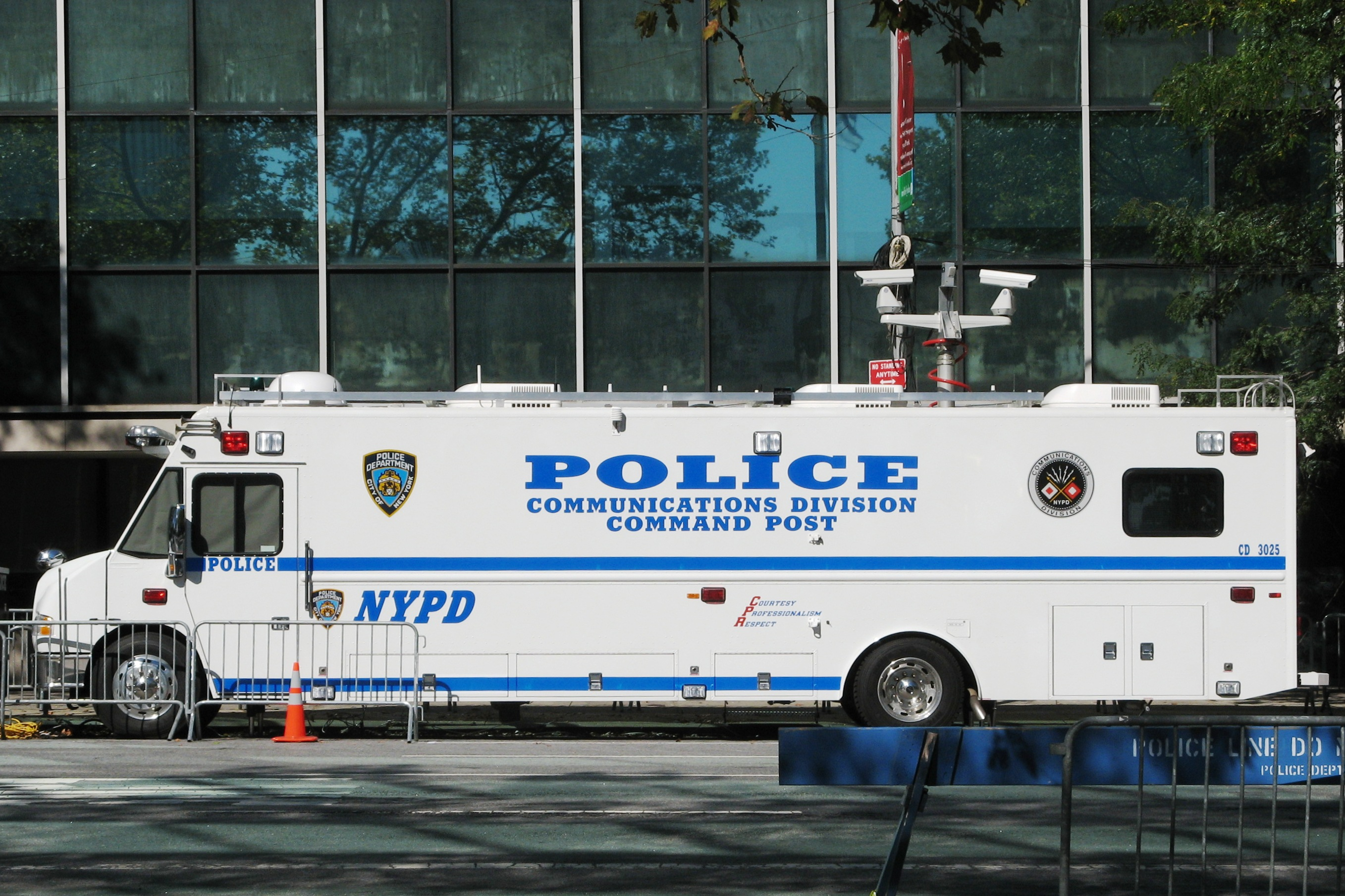 רכב פיקוד של משטרת העיר ניו יורק ליד בניין האומות המאוחדות